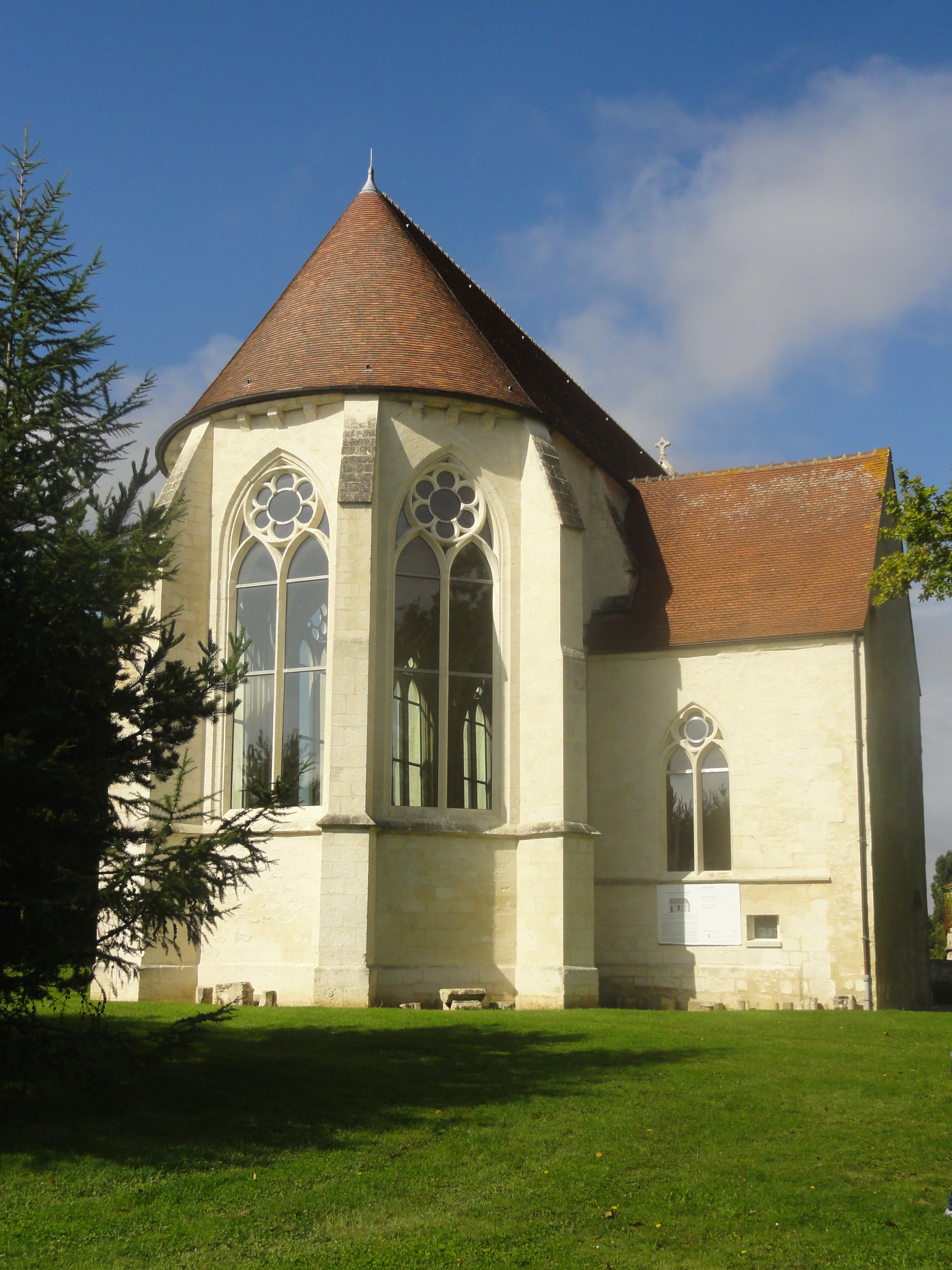 Chevet de la chapelle.